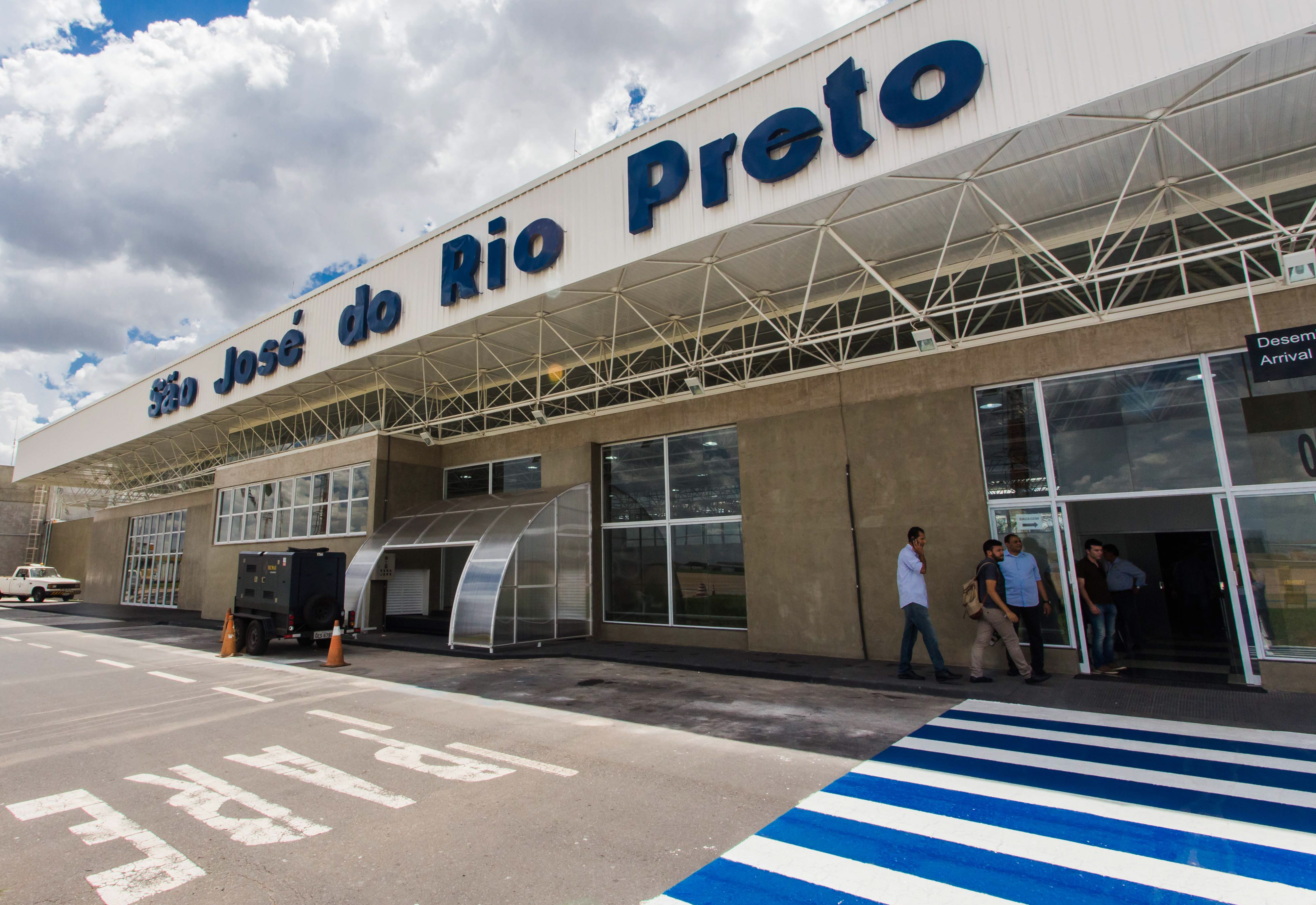 O Governador do Estado de São Paulo, Geraldo Alckmin, participou da Inauguração da ampliação e reforma do Terminal de Passageiros e do estacionamento do Aeroporto de São José do Rio Preto. Local: São José do Rio Preto/SP. Data: 16/11/2017. Foto: Alexandre Carvalho/A2img